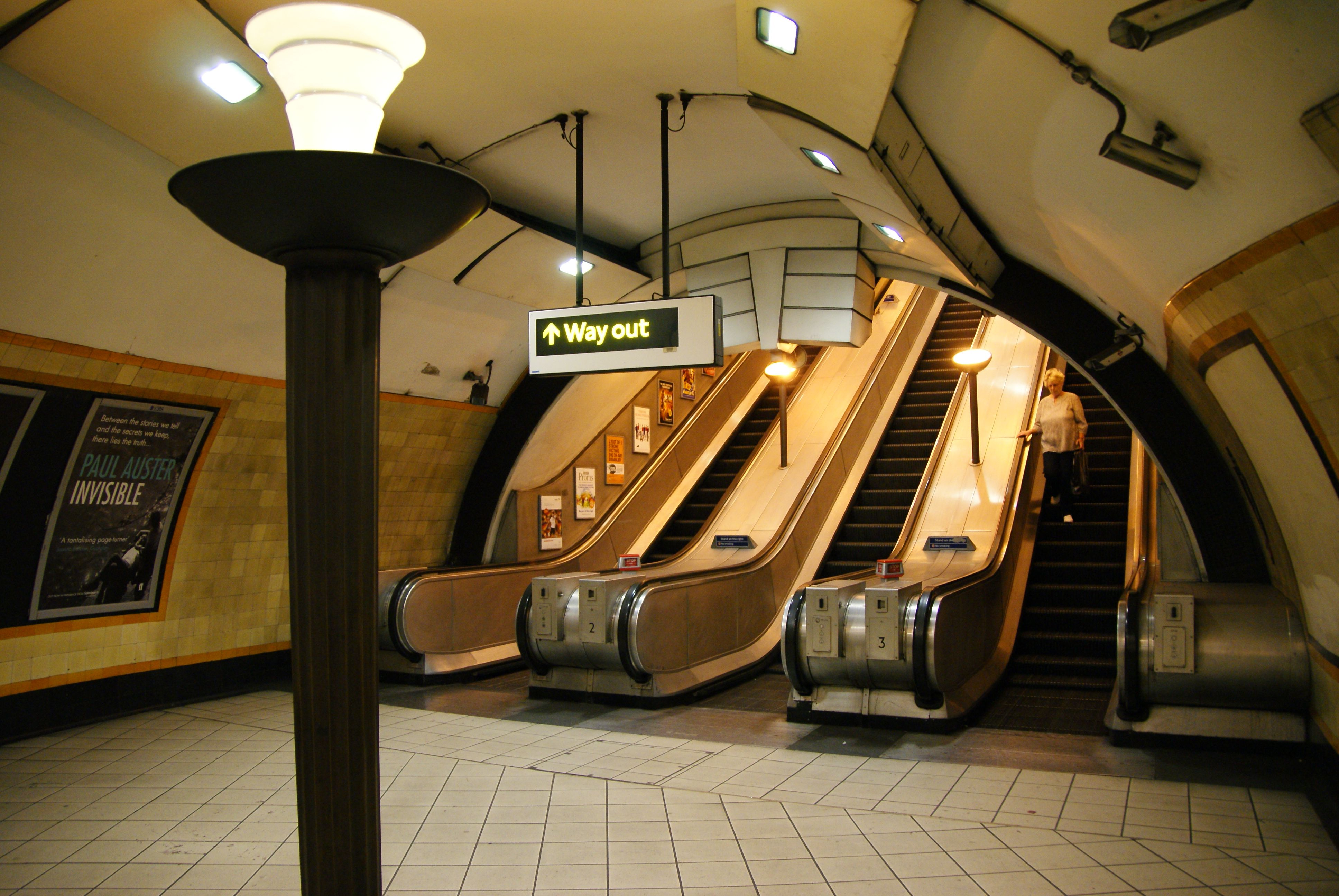 TURNPIKE LANE-03 240710 CPS